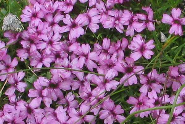 Silene acaulis (Lepnica bezłodygowa)